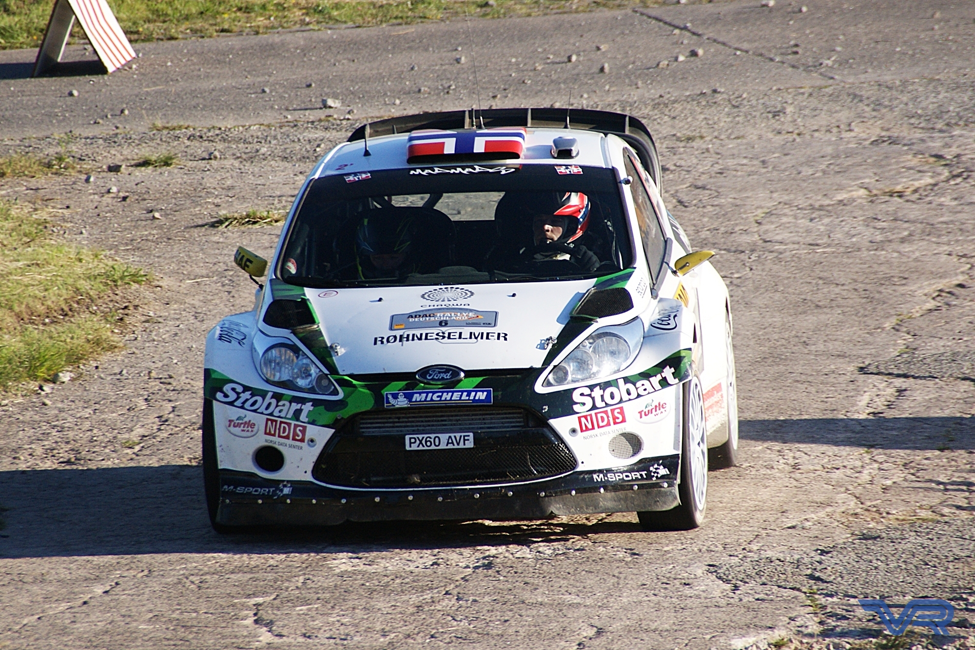 Mads Østberg podczas rajdu Niemiec 2011